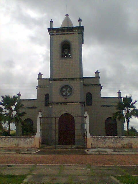 Igreja matriz de São Bento, no Maranhão.